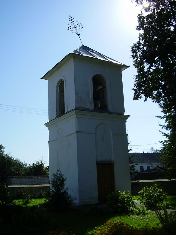 Лунна. Касцёл. Званіца